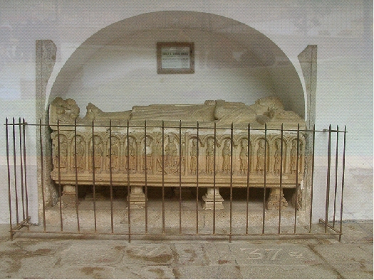 Túmulo de D. Rodrigo Sanches, Senhor Medieval (1245)